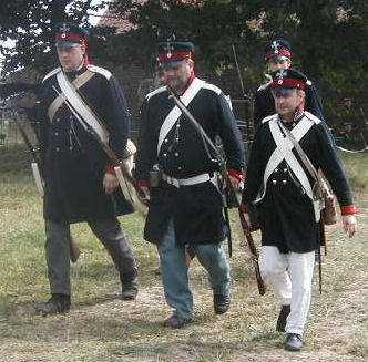 Photo personnelle (juin 2005) de Micharlemagne Description Eléménts de la Landwehr prussienne à Plancenoit, lors de la reconstitution de juin 2006 Date19 June 2006SourceOwn work by the original uploaderAuthorUtilisateur:MicharlemagnePermission(Reusing this file) Publié sous licence CC-BY-SA-2.5 Eléménts de la Landwehr prussienne à Plancenoit, lors de la reconstitution de juin 2006